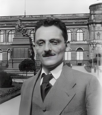 Der Prager Autor Max Brod 1914 vor dem Denkmal Friedrich Augusts des Gerechten und der Sempergalerie im Dresdner Zwinger